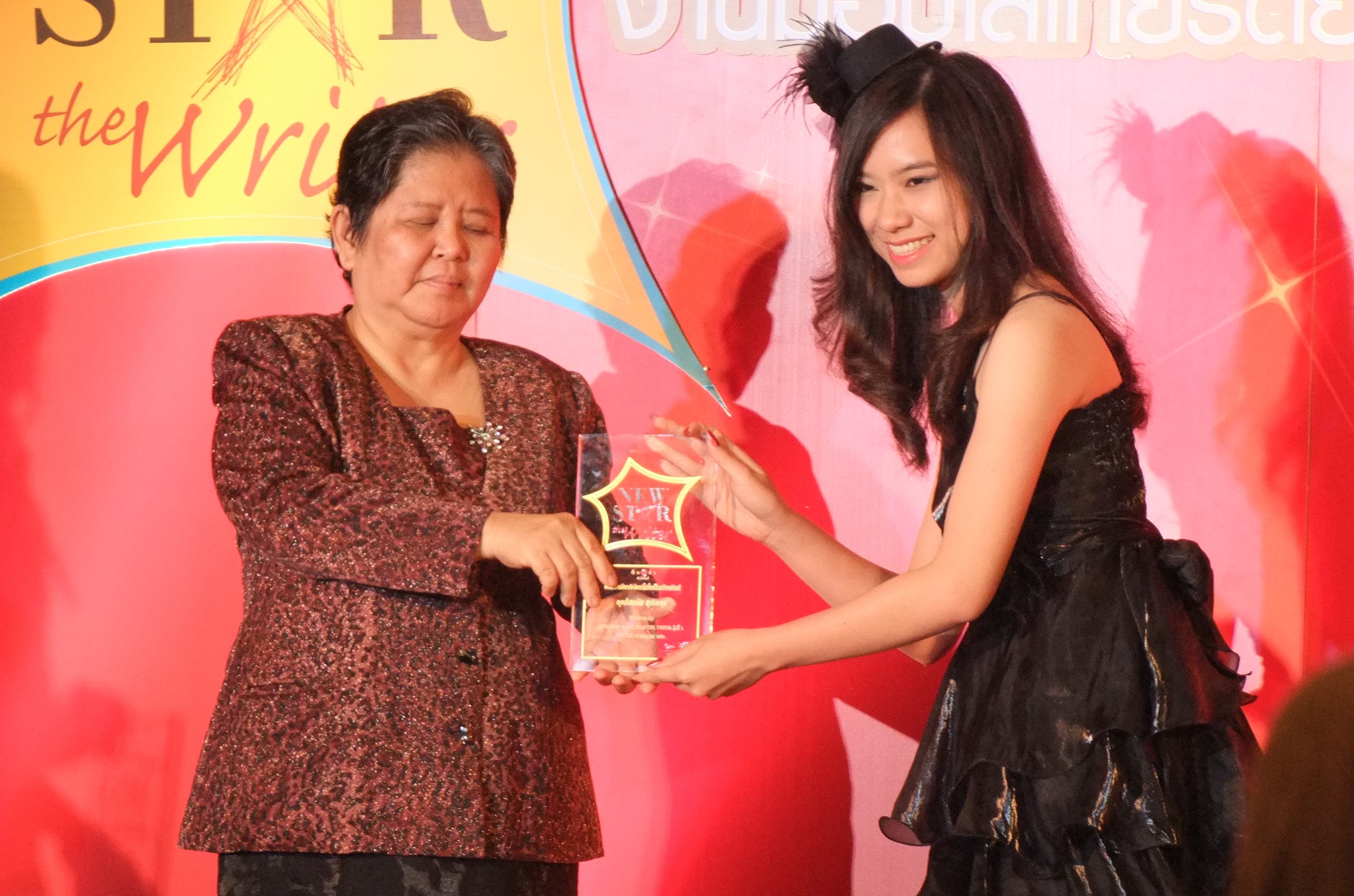 การรับโล่เกียรติยศโครงการ NEW STAR The writer